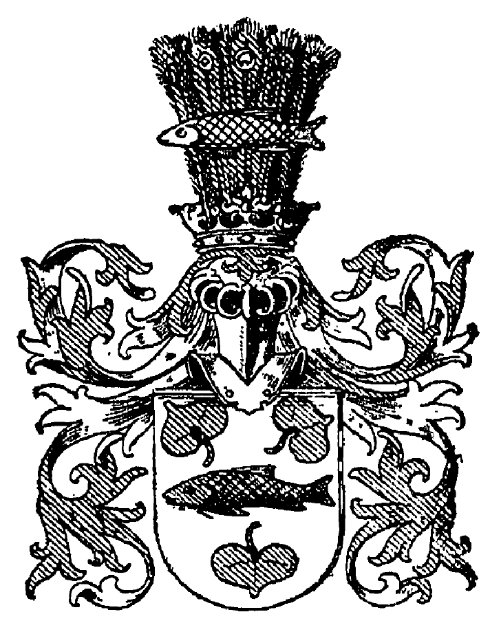 Wappen der von Barsewisch